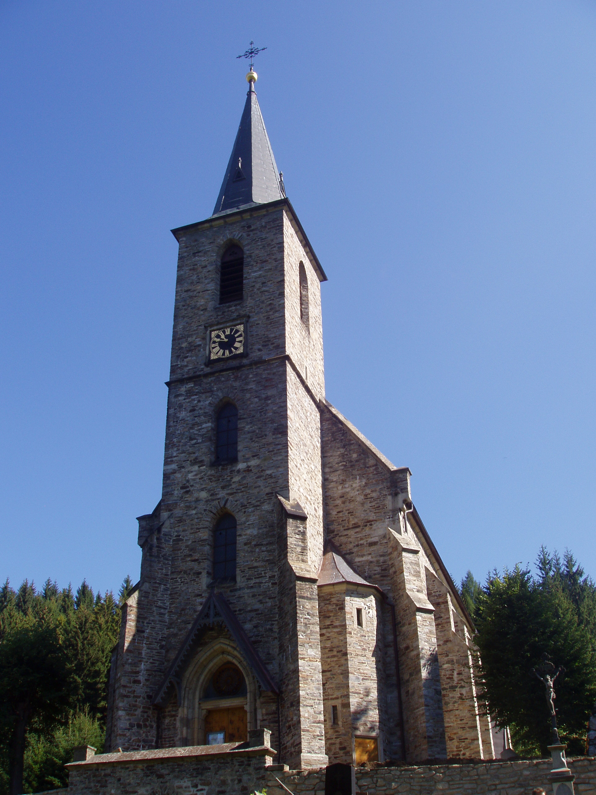 Kostel sv. Jana Křtitele v Horním Údolí, okres Jeseník.